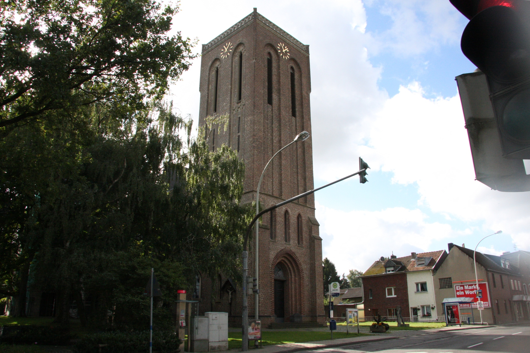 Katholische Pfarrkirche St. Lucia, Würselen